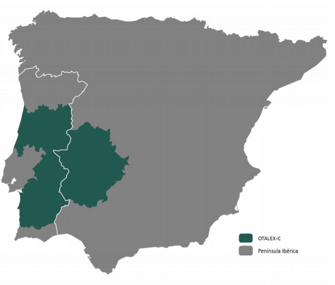 Mapa de la eurorregión EUROACE, que comprende las regiones de Alentejo y Centro en Portugal y la Comunidad Autónoma de Extremadura en España